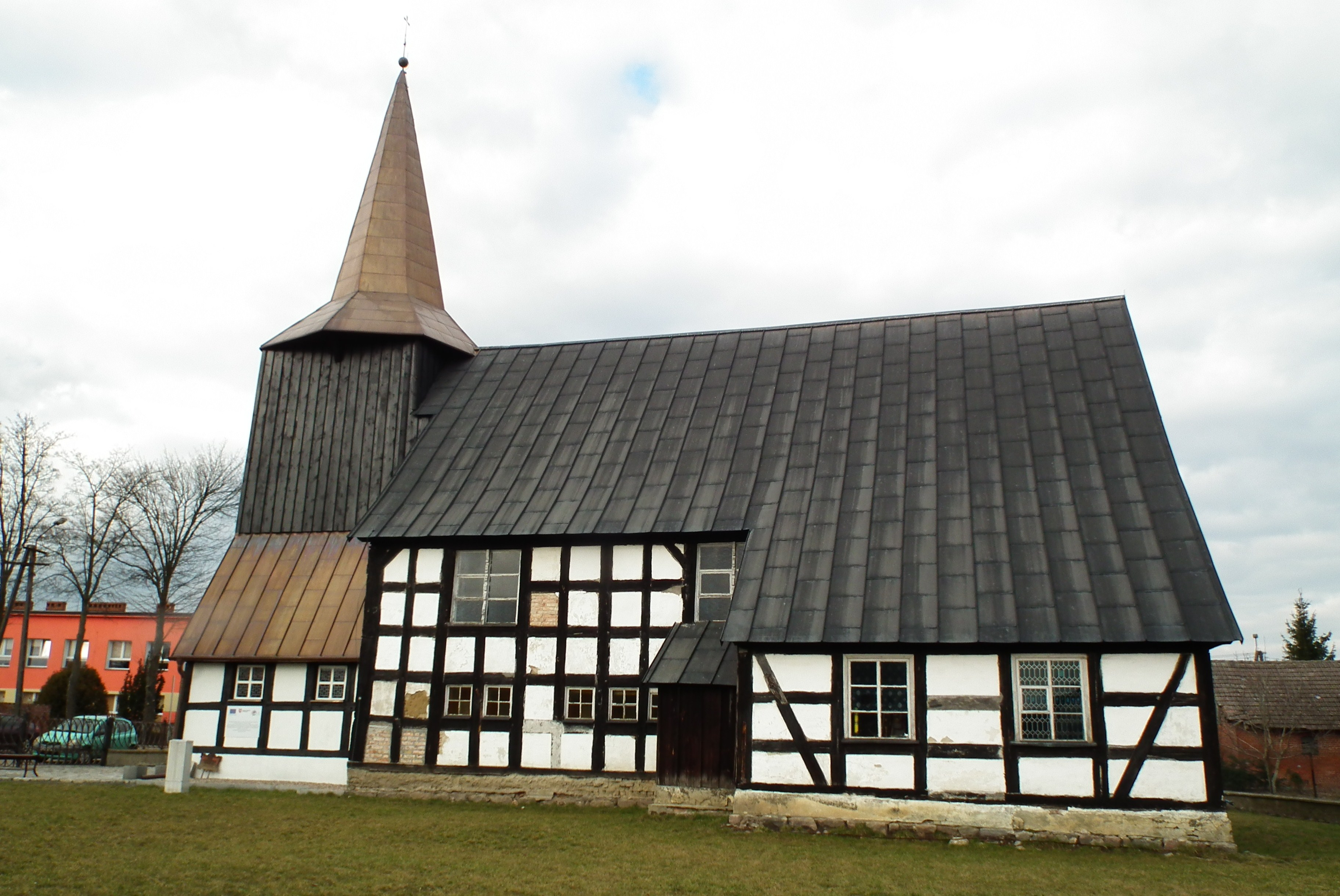 Kościół NMP w Lotyniu.